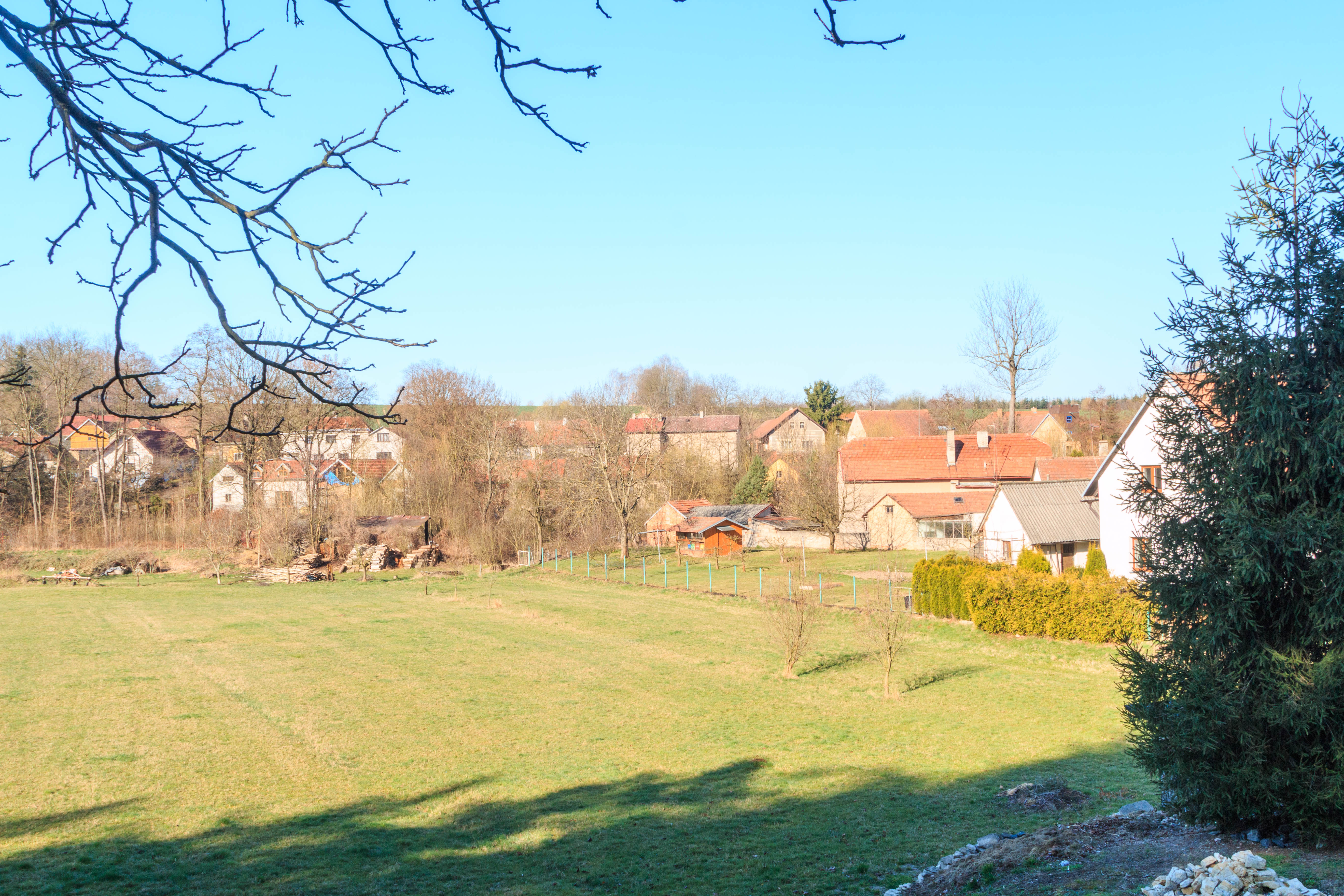 Zdislav - pohled z pěšiny od hradu Košumberk